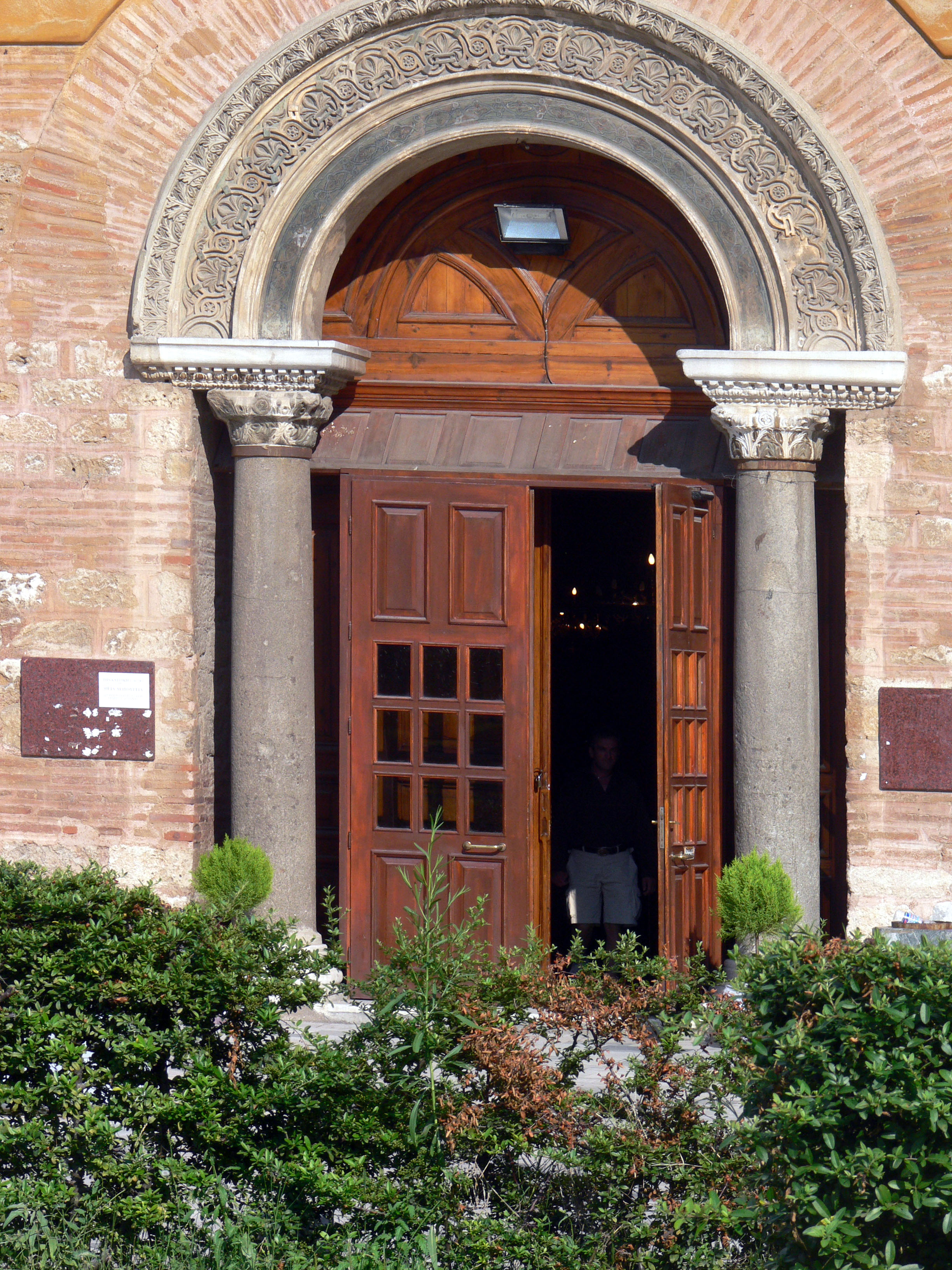 Tessaloniki. Agia Sophia. Eingang